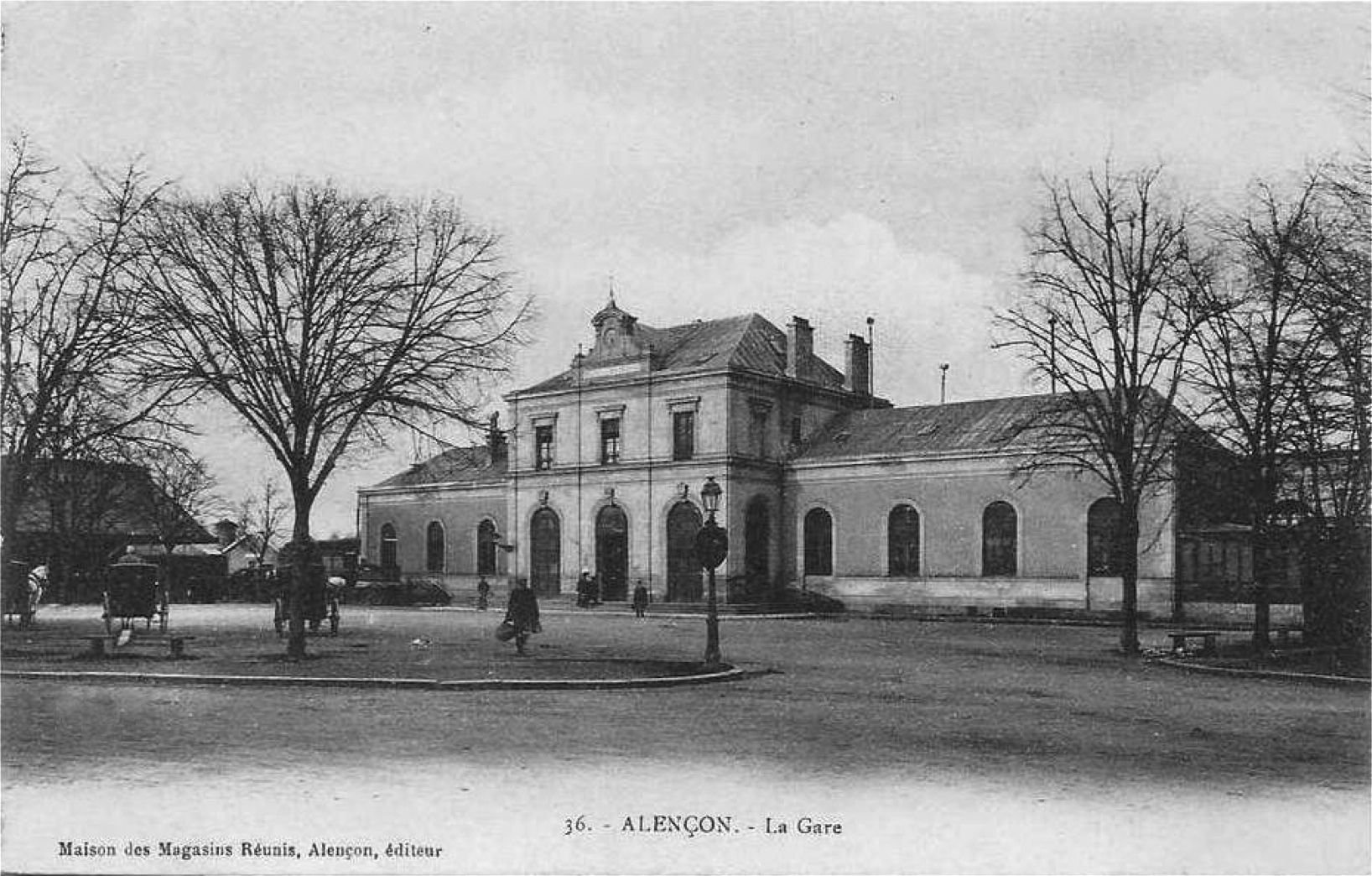 La place de la gare d'Alençon et sont bâtiment voyeurs. Des voitures, à cheval, sont en attente.